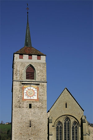 Moudon: Eglise Saint-Etienne